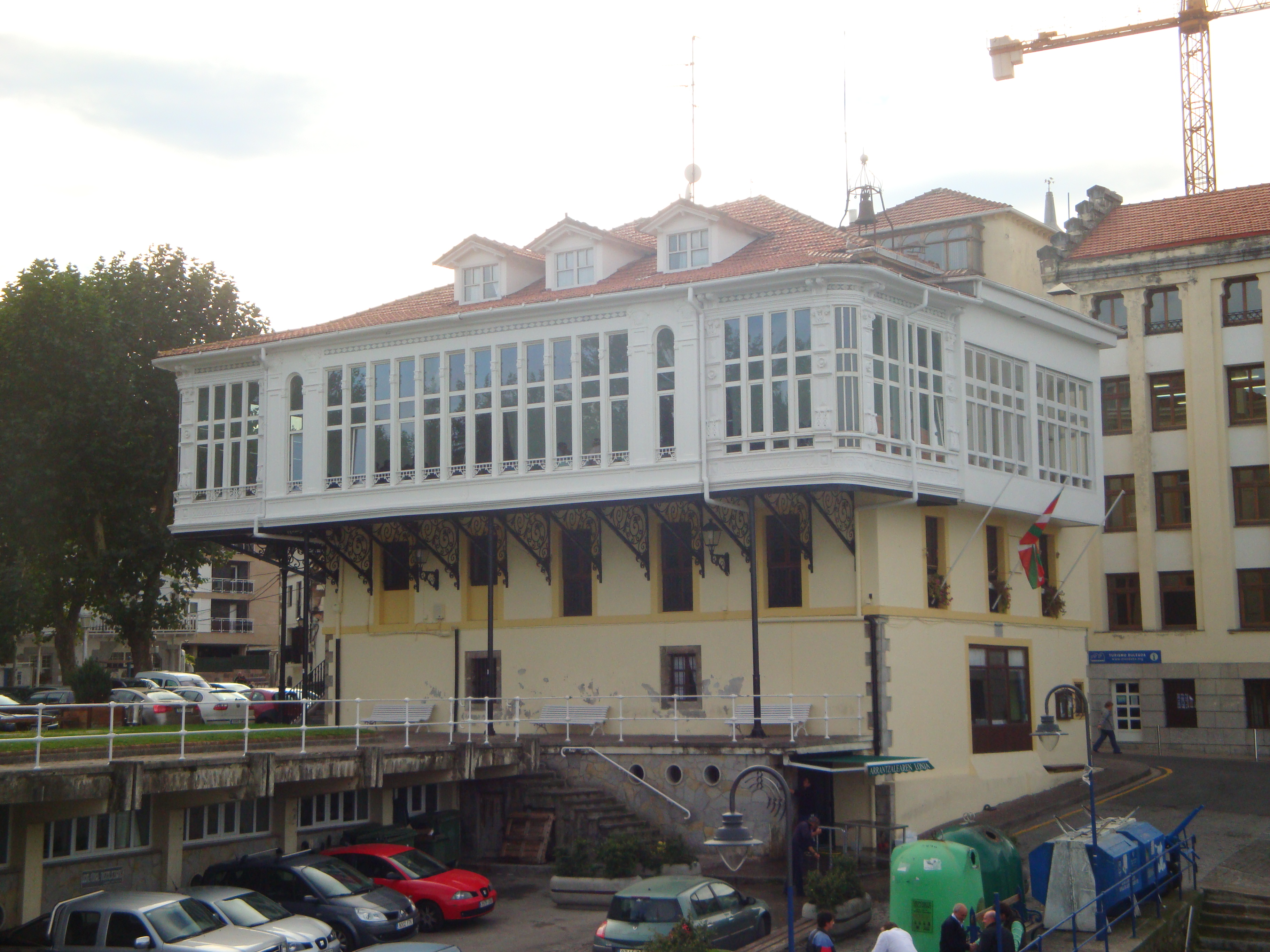 Casino de Mundaca (Vizcaya)